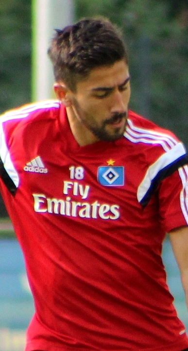 Kerem Demirbay beim HSV-Training am 14. August 2014.